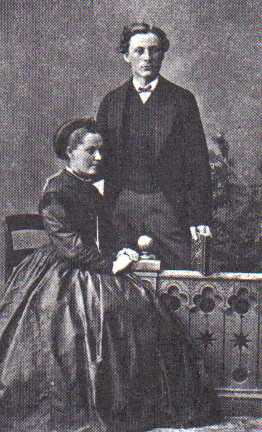 Joakim Larsen (1846-1920), etatsråd, lærer og skoledirektør på Frederiksberg, mange tillidsposter, bl.a. formand for Danmarks Lærerforening 1895-1900. Billedet viser Joakim Larsen og hans hustru Elise, født Kirchhoff, som nygifte.